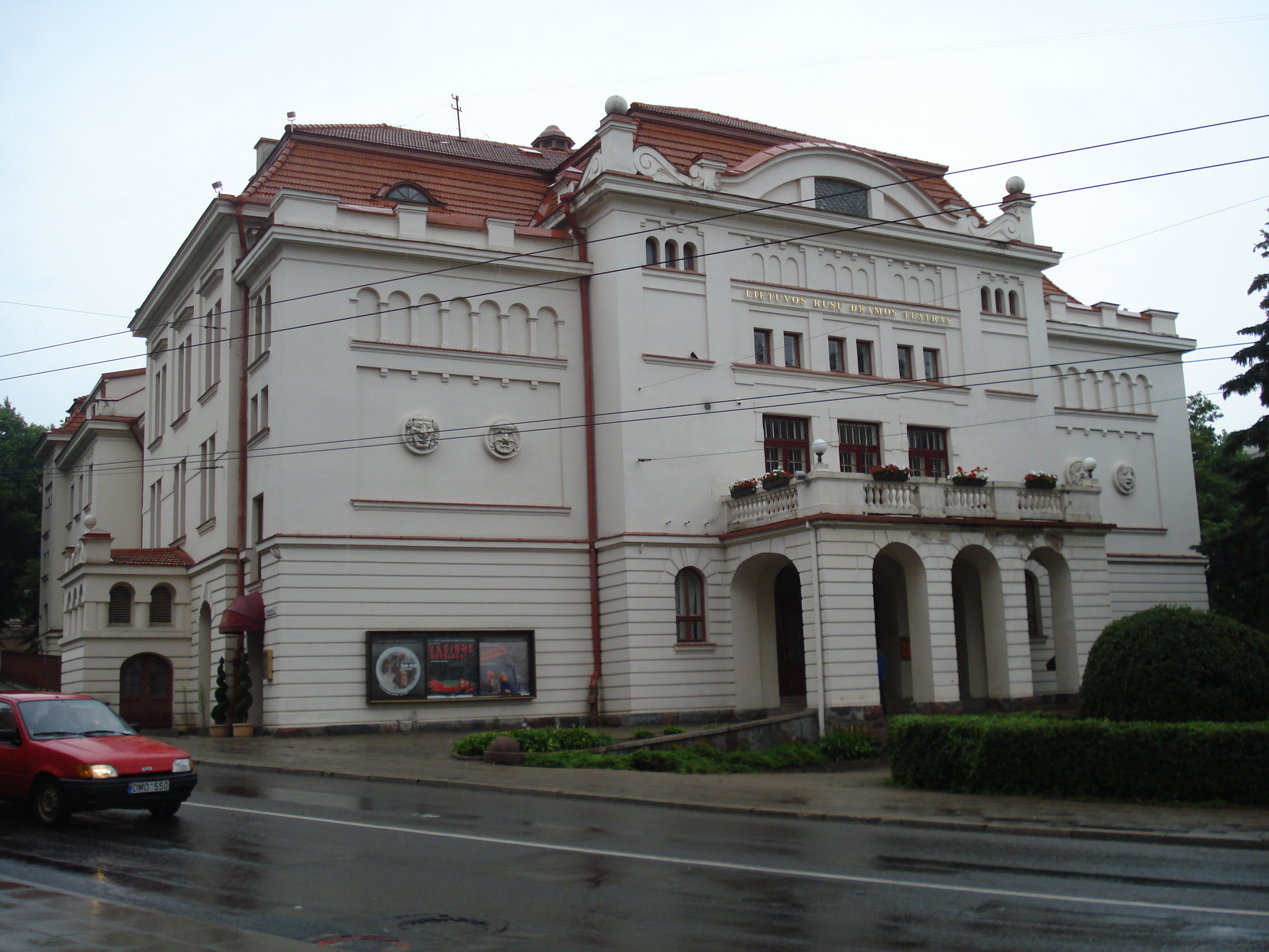 Russian Drama Theatre in Vilnius (J. Basanavičiaus g. 13)